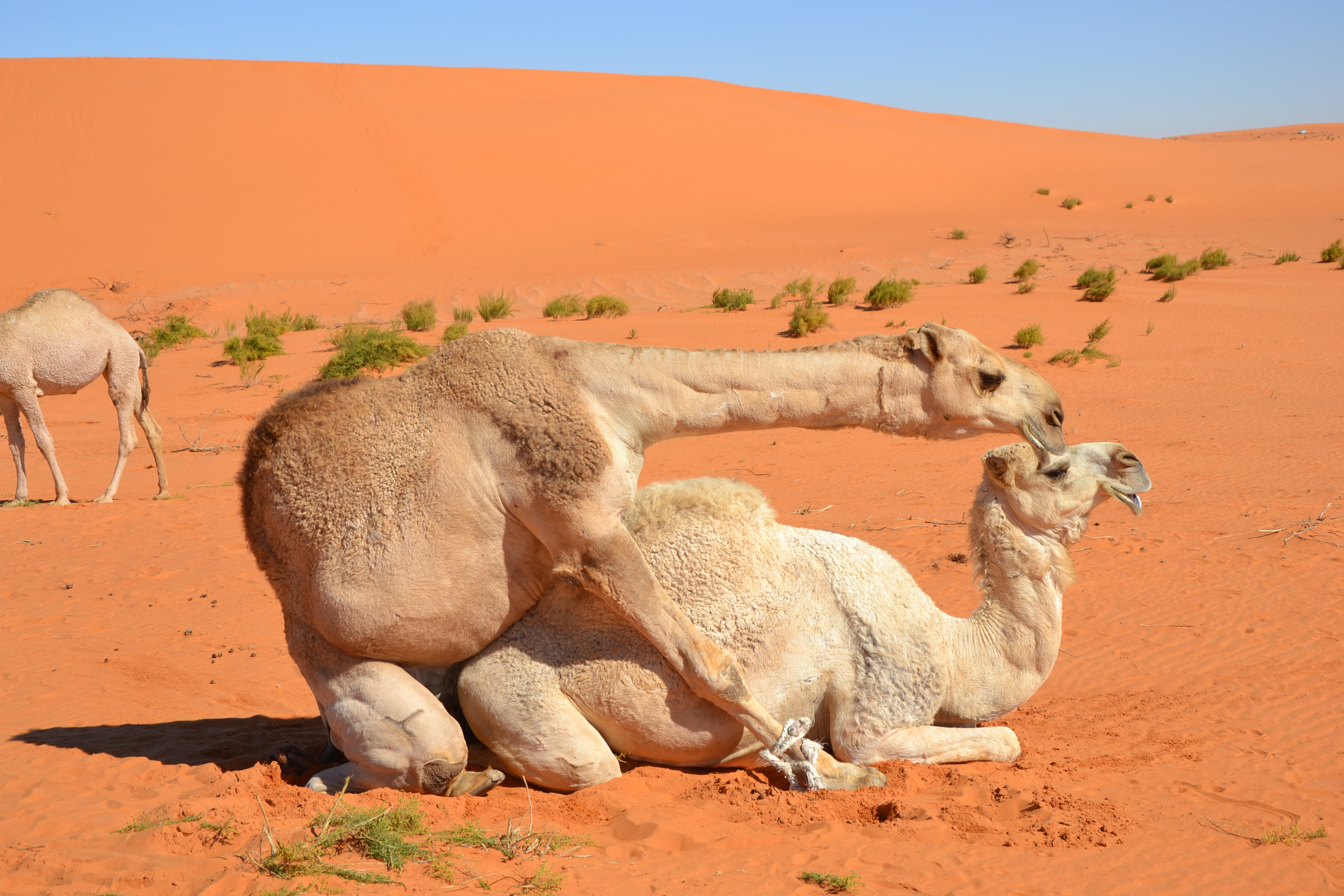 Camelus dromedarius mating